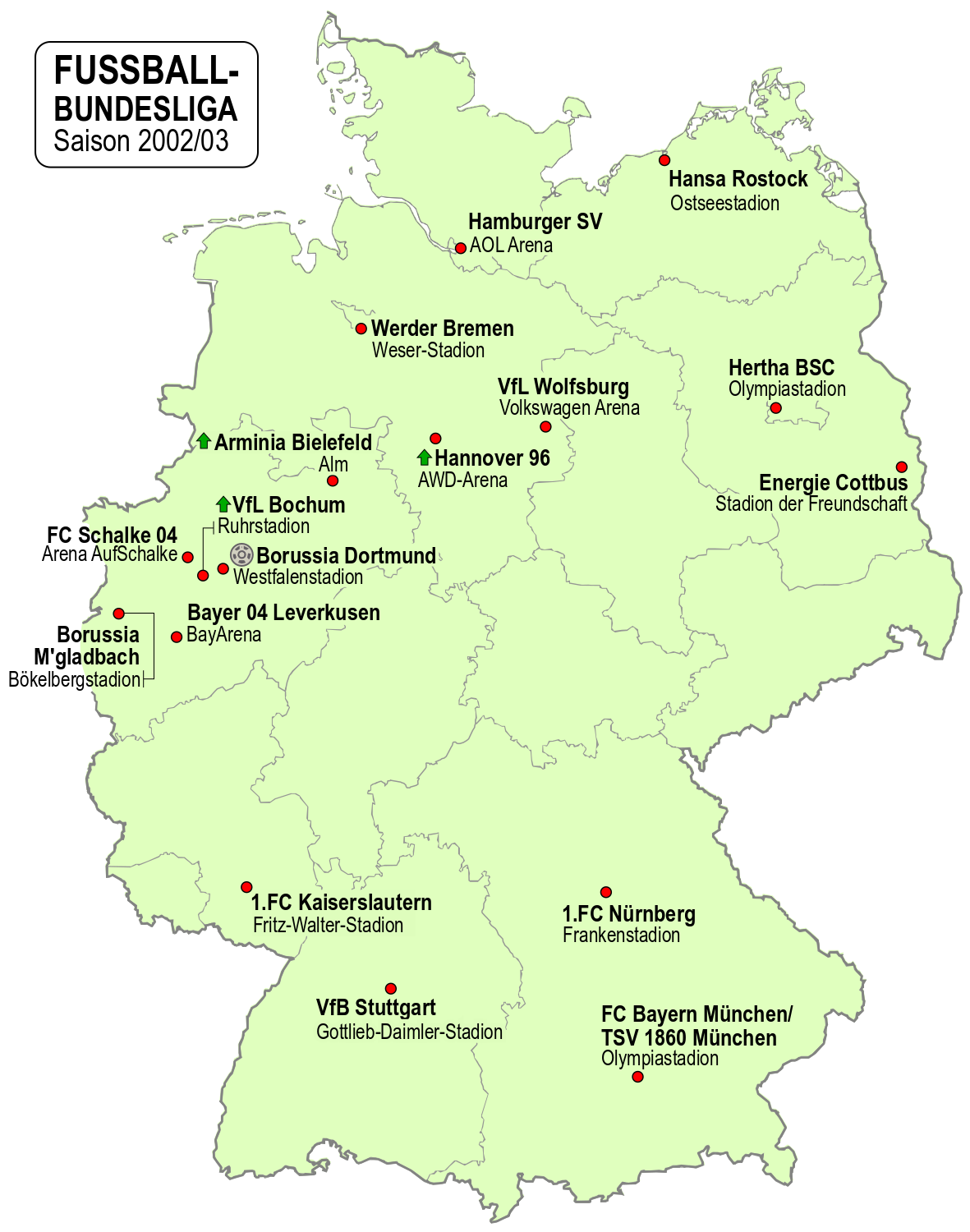 Karte der Vereine der Fussball-Bundesliga-Saison 2002/03